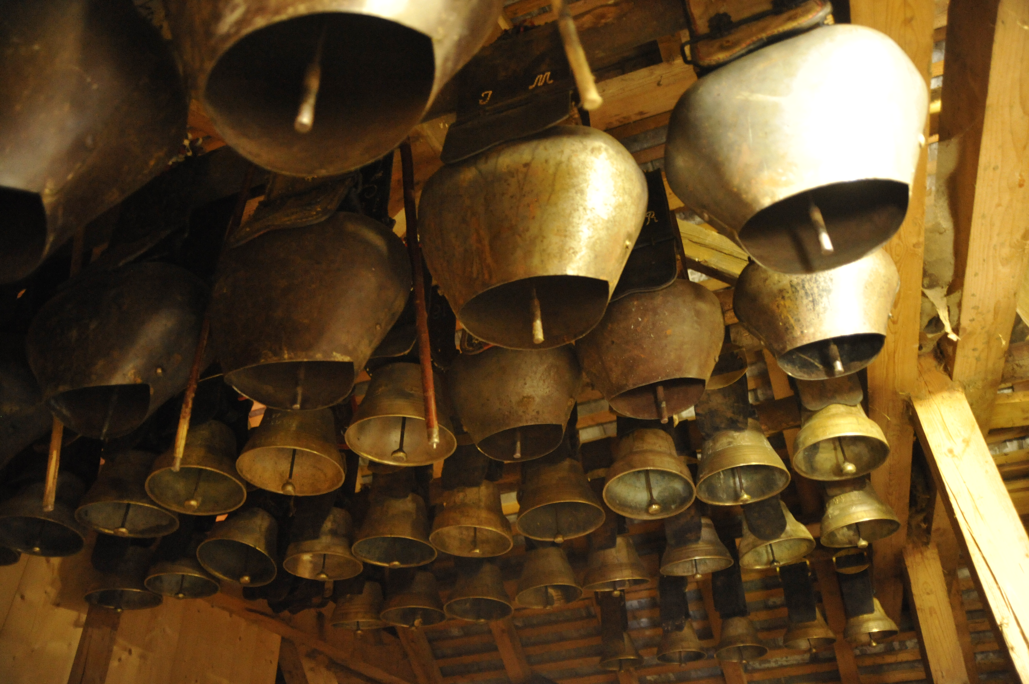 Collection de cloches dans un chalet d'alpage